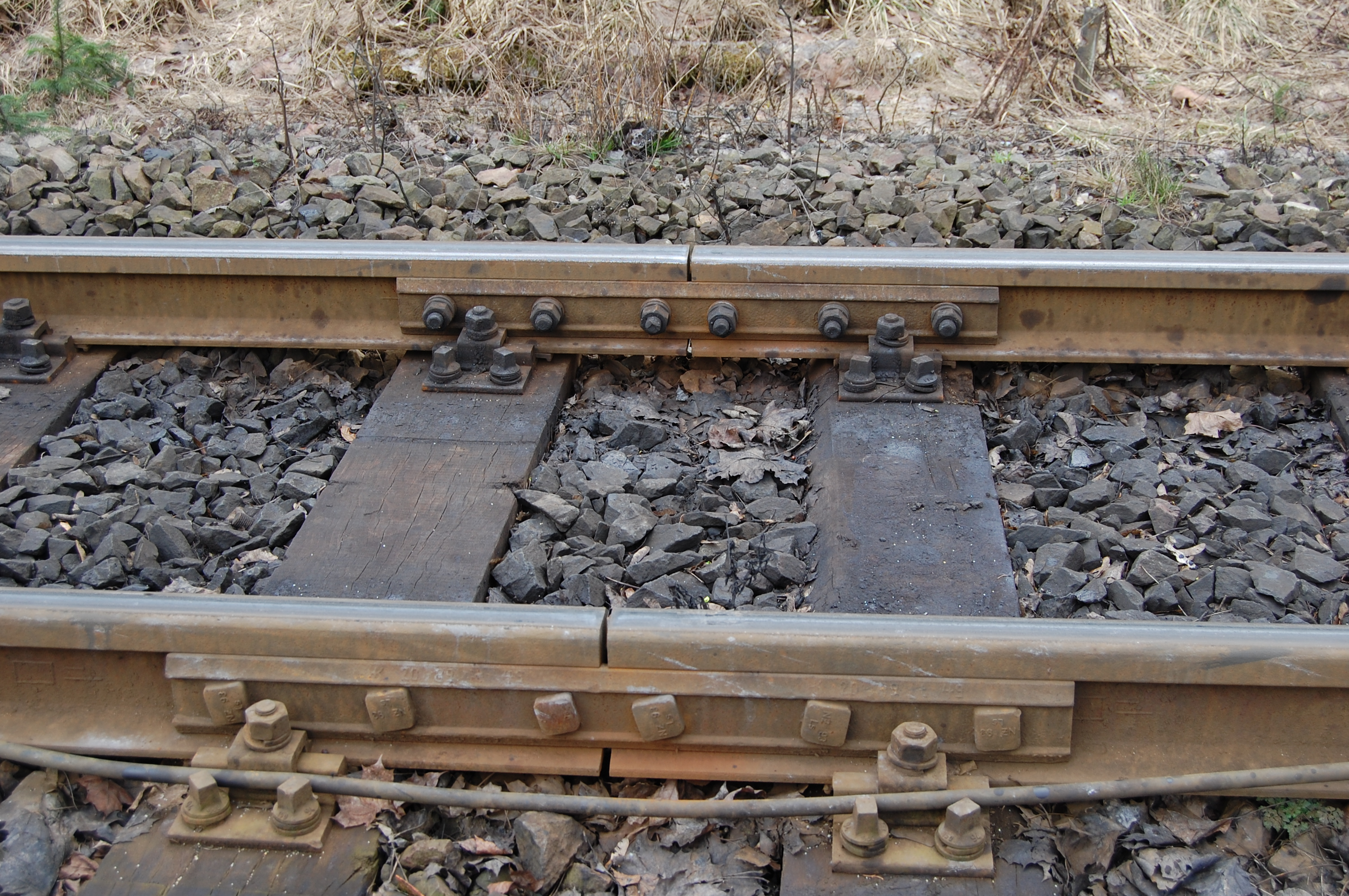 Gelaschter, beweglicher Schienenstoß in Drei Annen an der Harzquerbahn